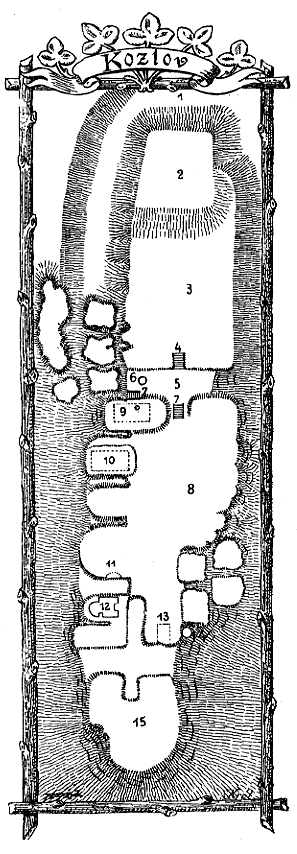 Chlum-Kozlov – půdorys hradu od Vojtěch Krále z Dobré Vody publikovaný roku 1895; Popis: 1 – příkop, 2 – předhradí, 3 – nižší část předhradí, 4 – schody do příkopu, 5 – příkop, 6 – vězení, 7 – schodiště, 8 – nádvoří, 9 – sklep se sloupem (kuchyně), 10 – sklep (obydlí), 11 – skála s výklenkem, 12 – sklep s pilíři (kaple?), 13 – čtverhranný zásek ve skále, 14 – studna nebo cisterna, 15 – skály se záseky